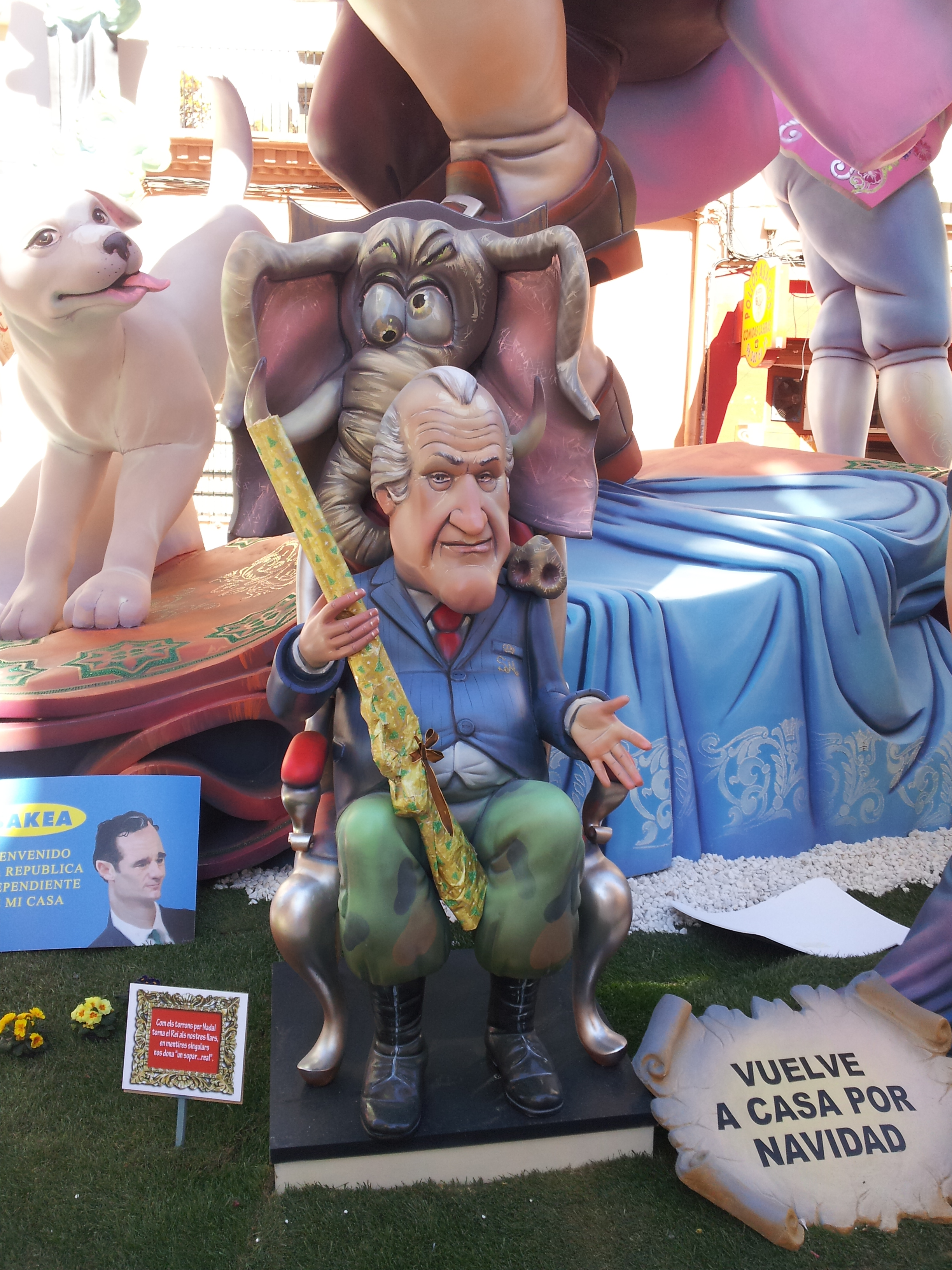 Escenes de la falla Lo Rat Penat de 2013